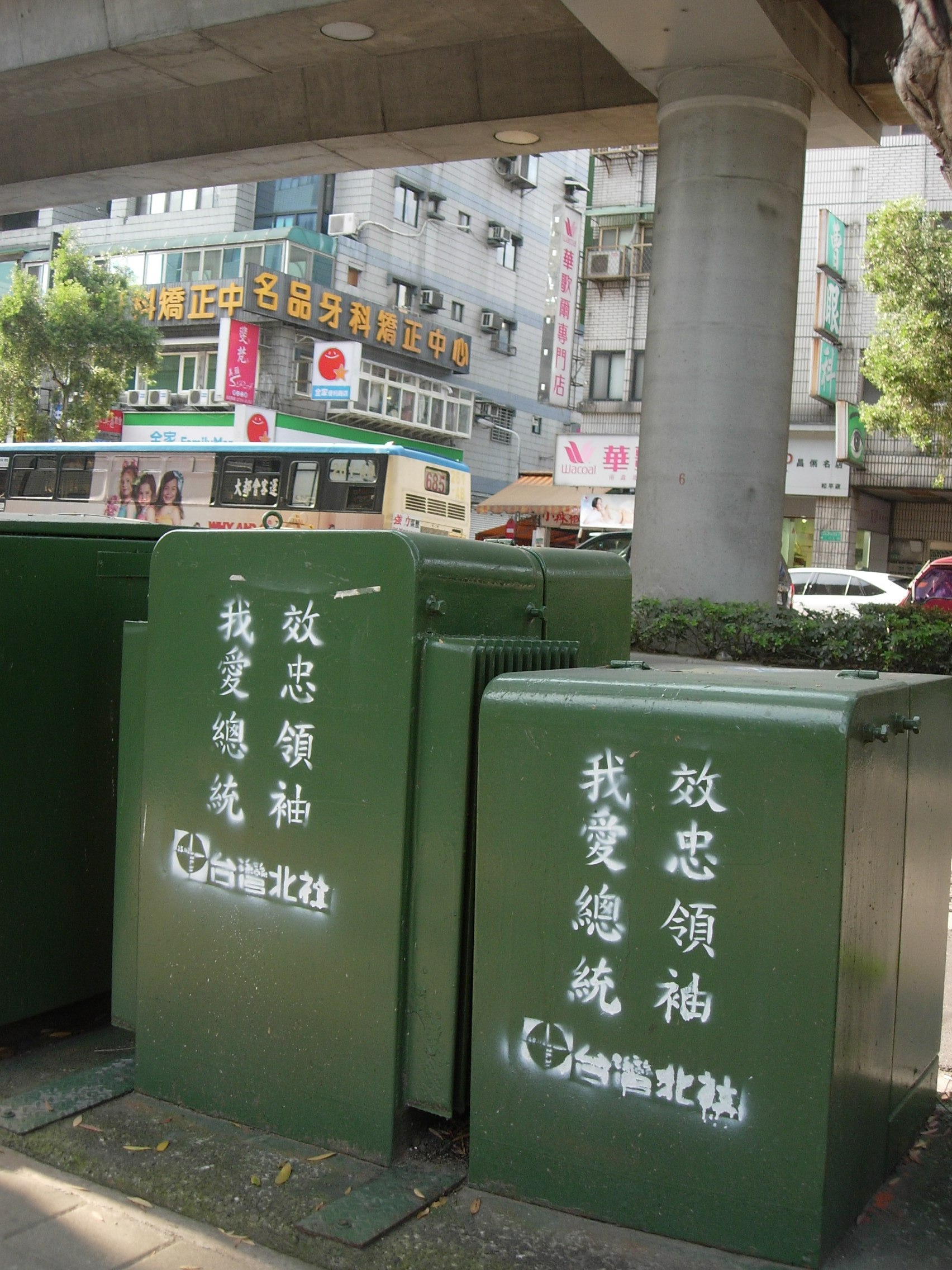 中文（台灣）: 台北市大安區和平東路二段變電箱上的「效忠領袖、我愛總統」塗鴉作品，反諷台灣北社大力支持陳水扁。